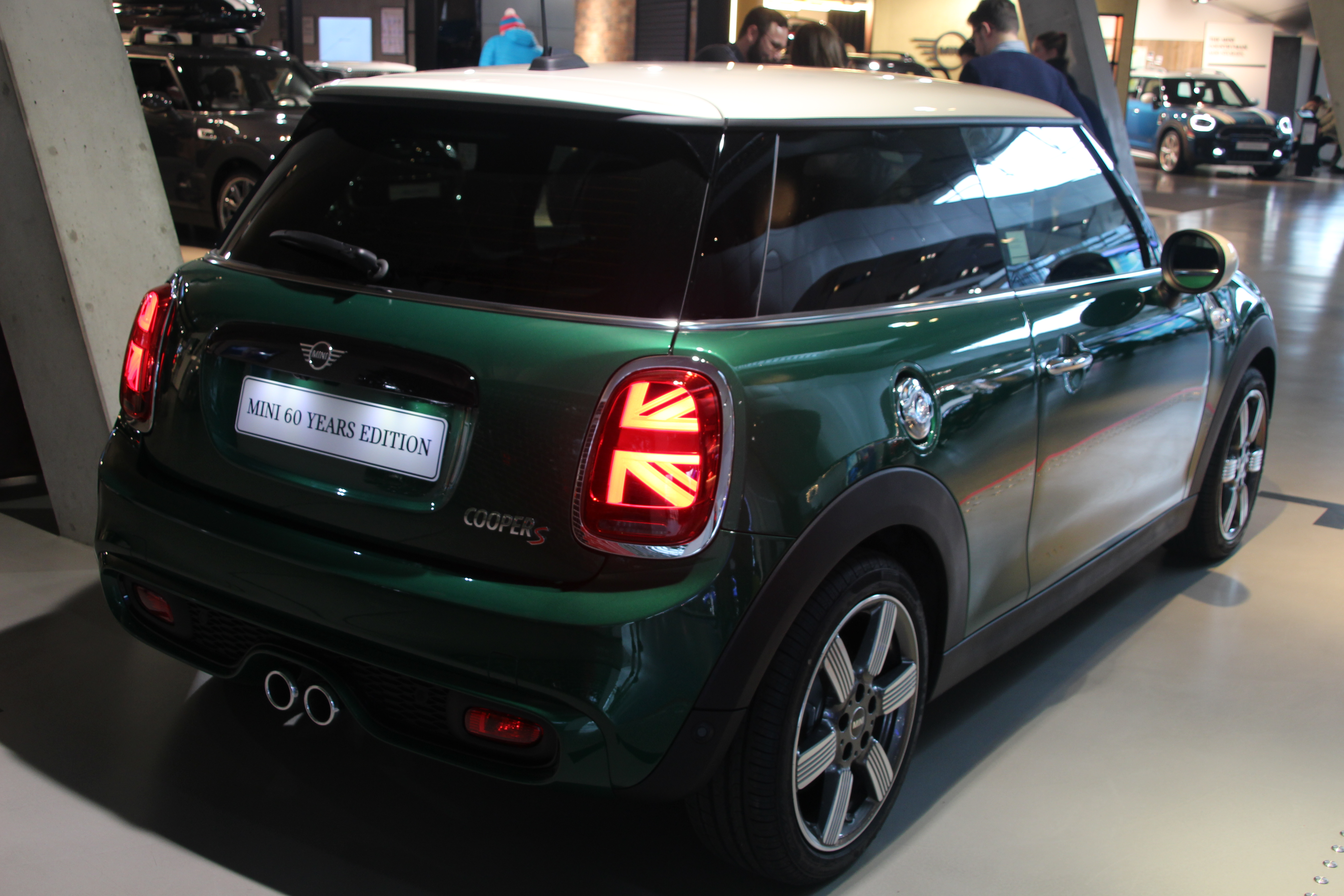 Mini F56 mit Union Jack-Rückleuchten, in der BMW Welt